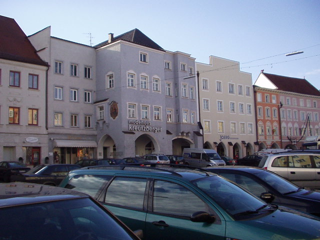 Altstadt Neuötting.